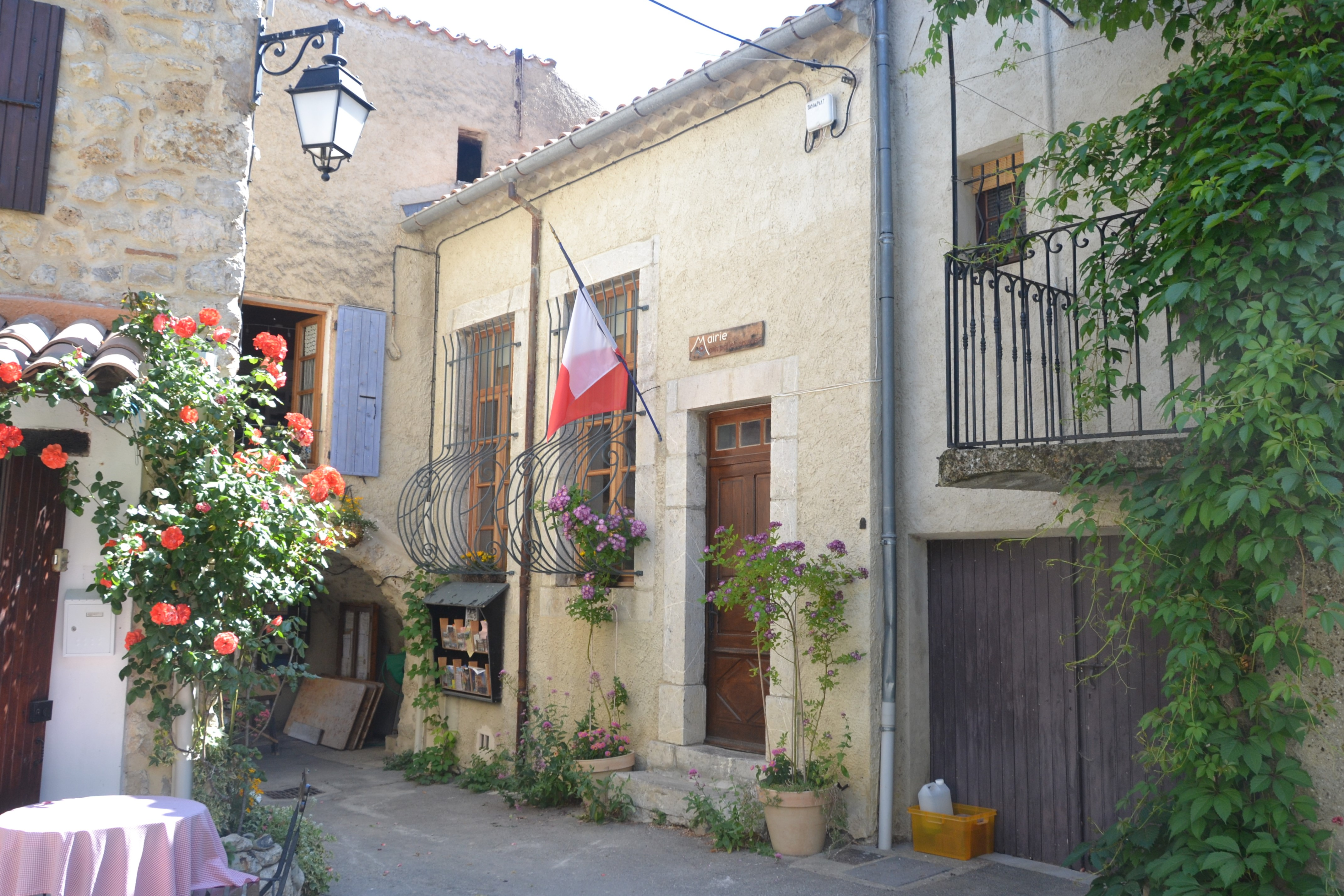 mairie de Montréal-les-Sources